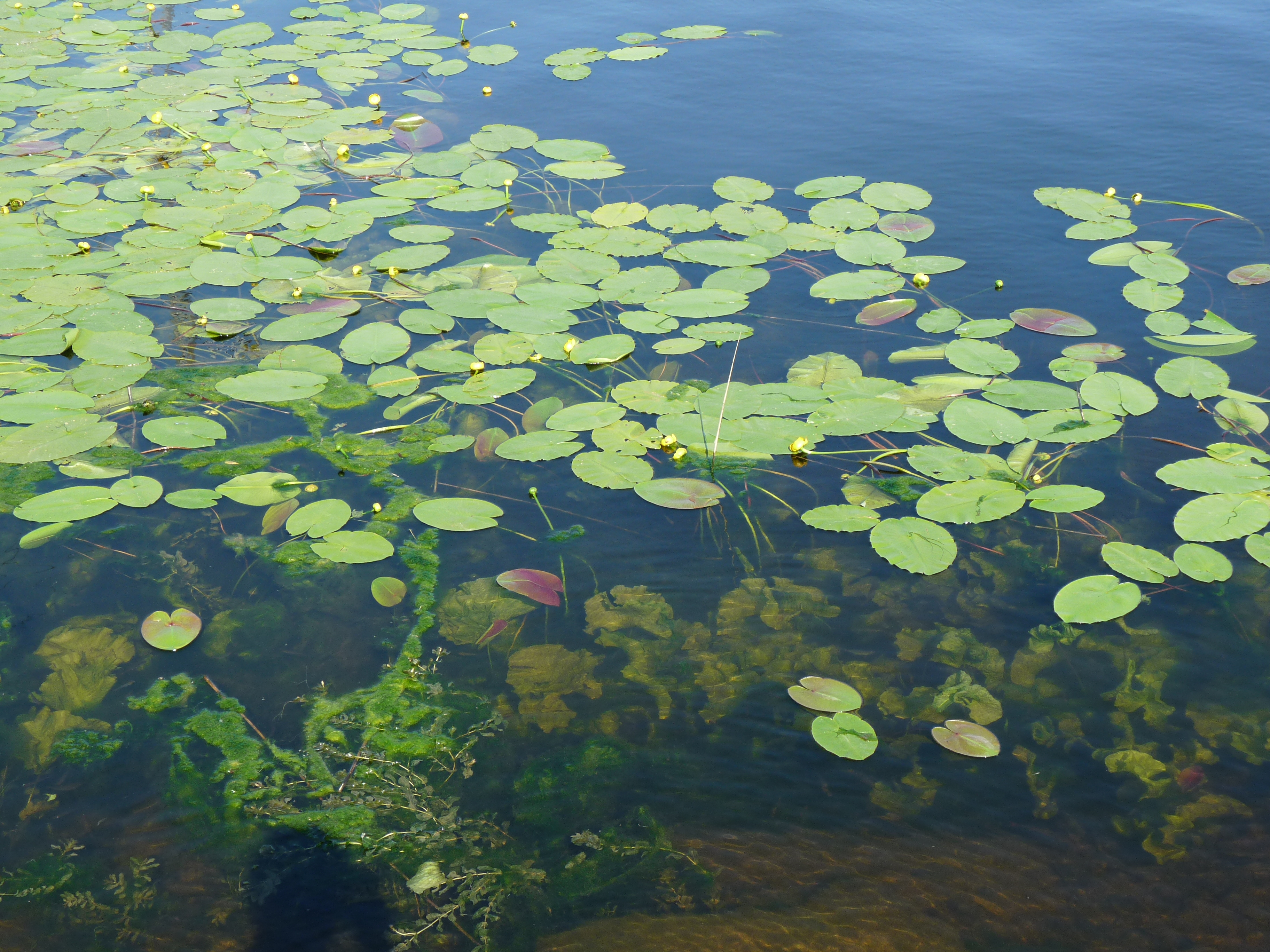 Waterplanten aan de Lielupe rivier bij het spoorstation van Majori